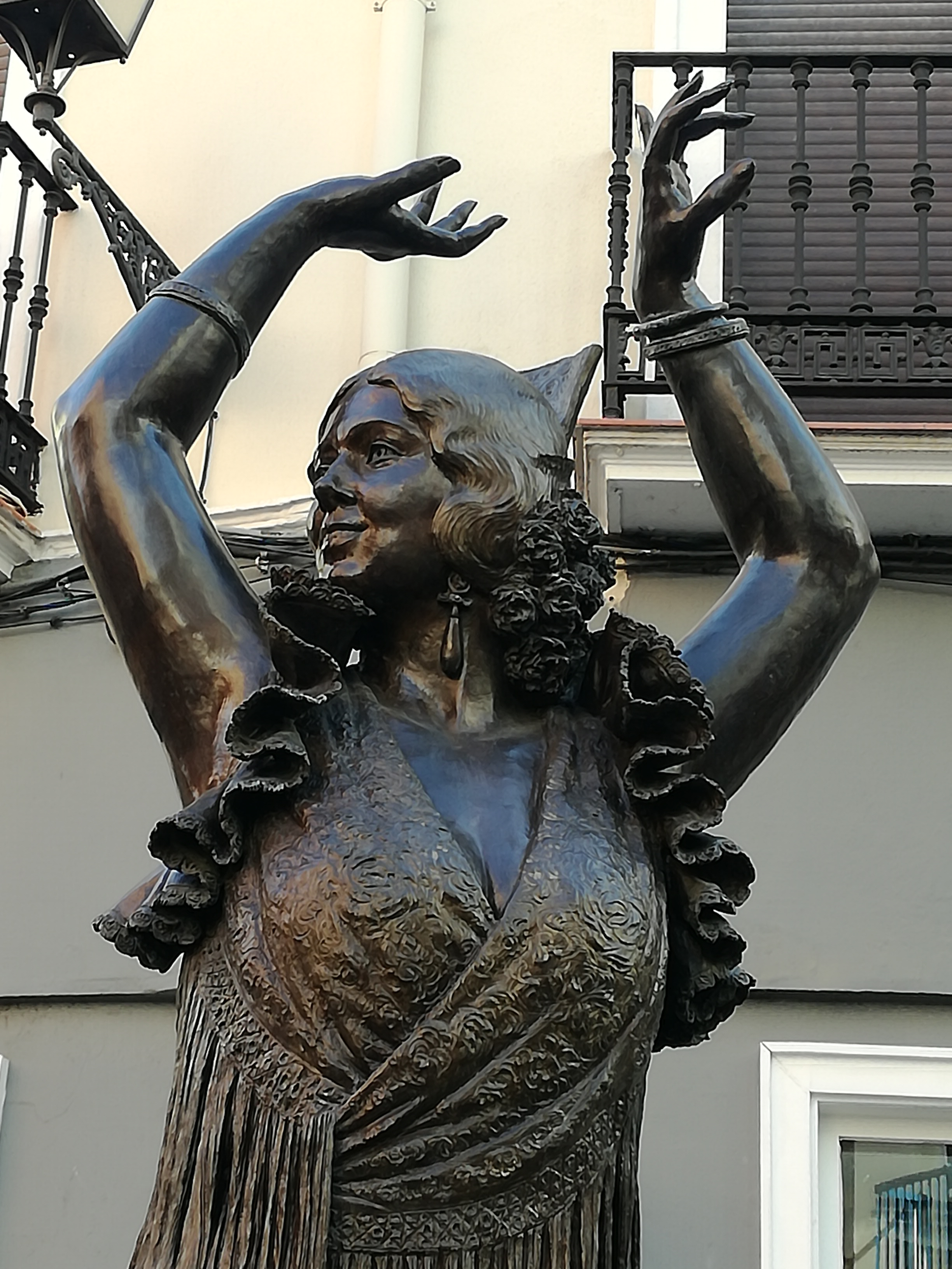 La escultura dedicada a Pastora Imperio está situada en Sevilla, en la confluencia entre la calle Velázquez y la calle O´Donnell. Inaugurada en 2006, es obra del artista Luis Álvarez Duarte y fue costeada por la Duquesa de Alba.